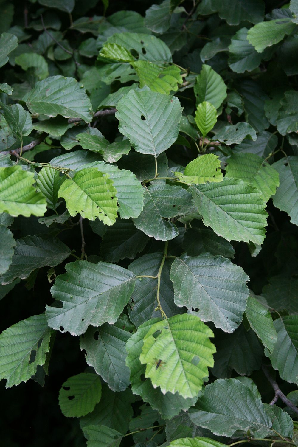 Alnus glutinosa subsp. barbata, Birkengewächse (Betulaceae) – Georgien/საქართველო: Kleiner Kaukasus, an der Straße zum Tskhratskaro-Pass, ca. 4,6 km SW Bakuriani/ბაკურიანი, ca. 1895 m s.m.